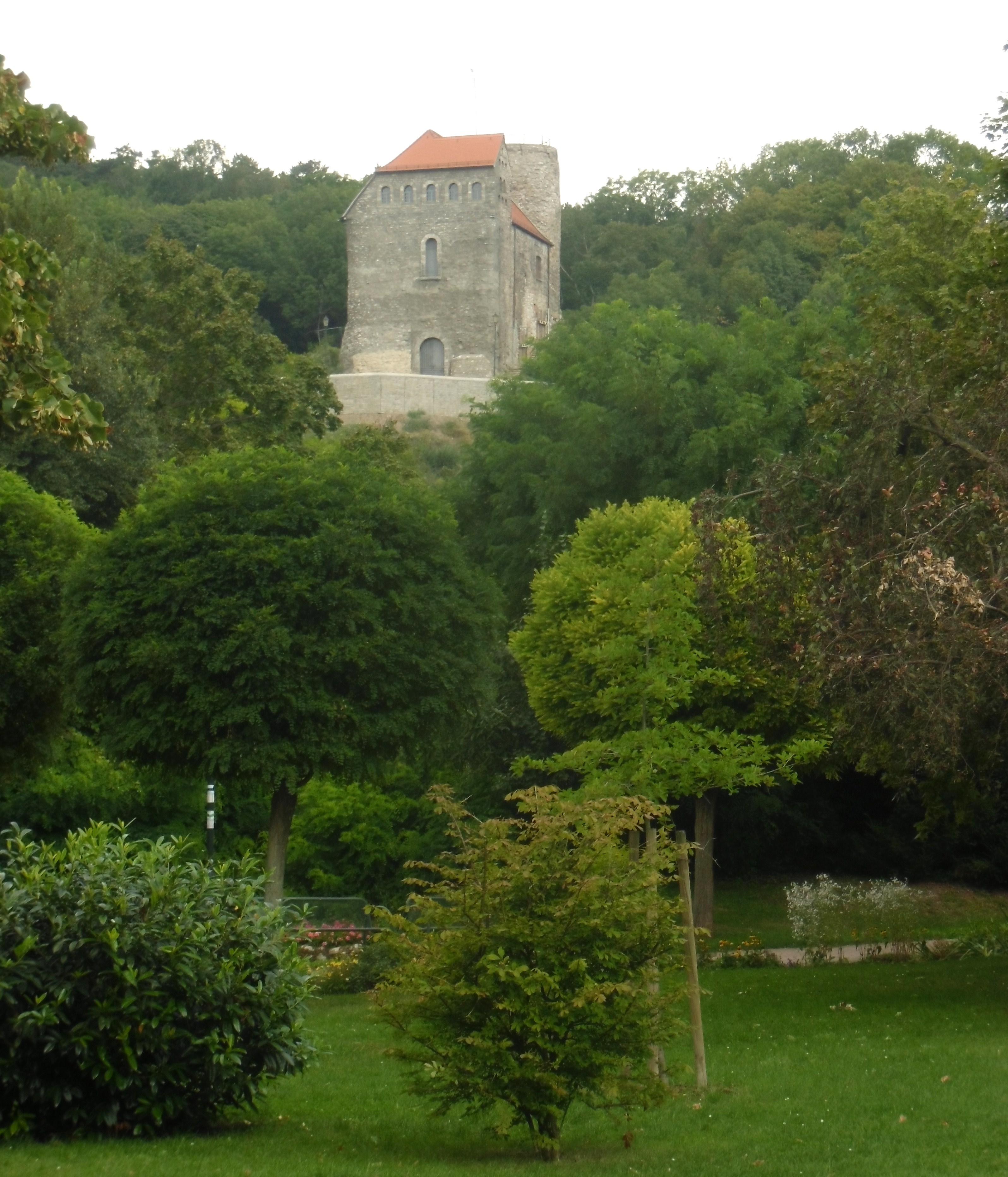 Teil der alten Stadtmauer von Bad Frankenhausen, 998 erstmals urkundlich erwähnt, im 13. Jahrhundert weiter ausgebaut